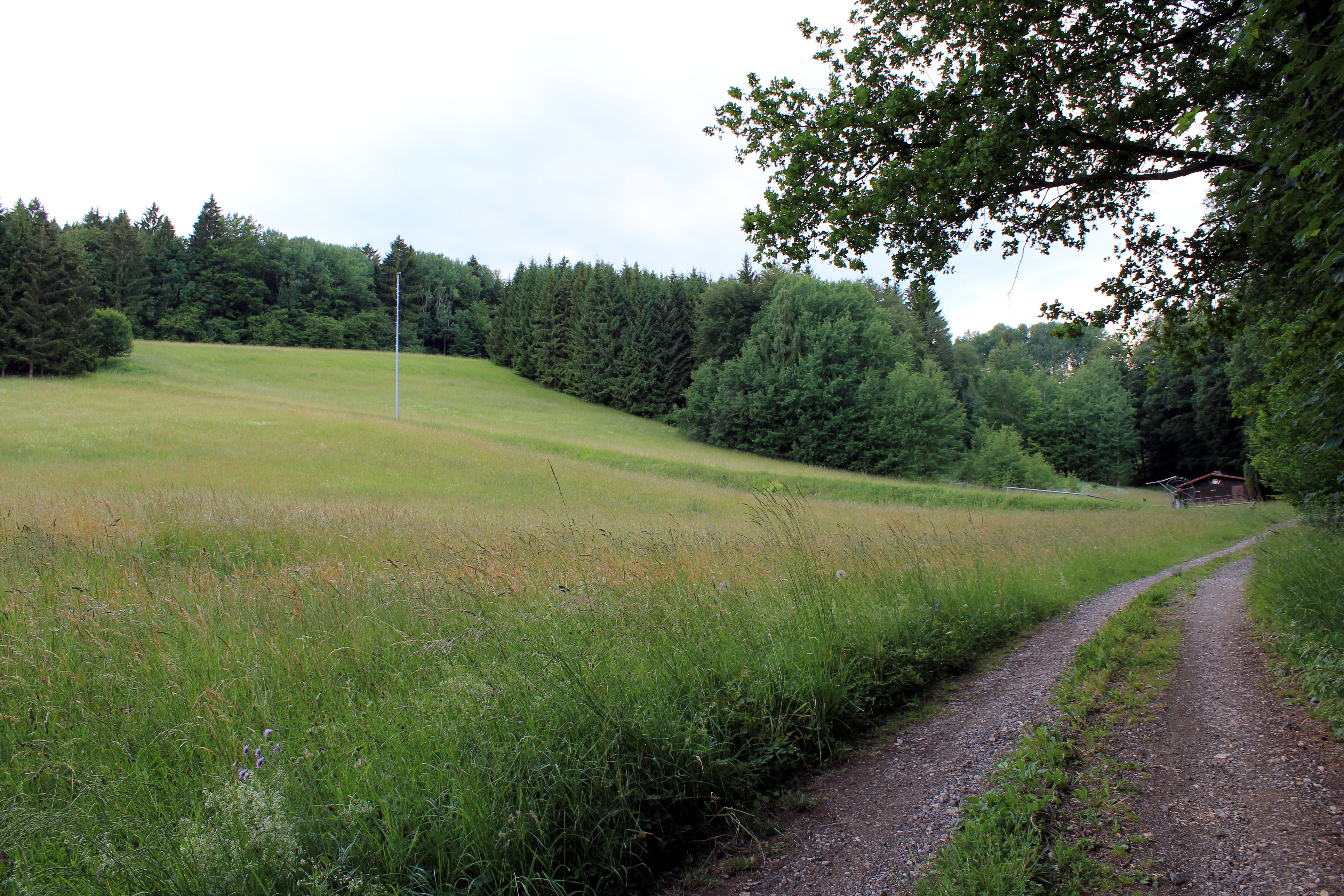 Blick auf den Skihang von Tauschendorf